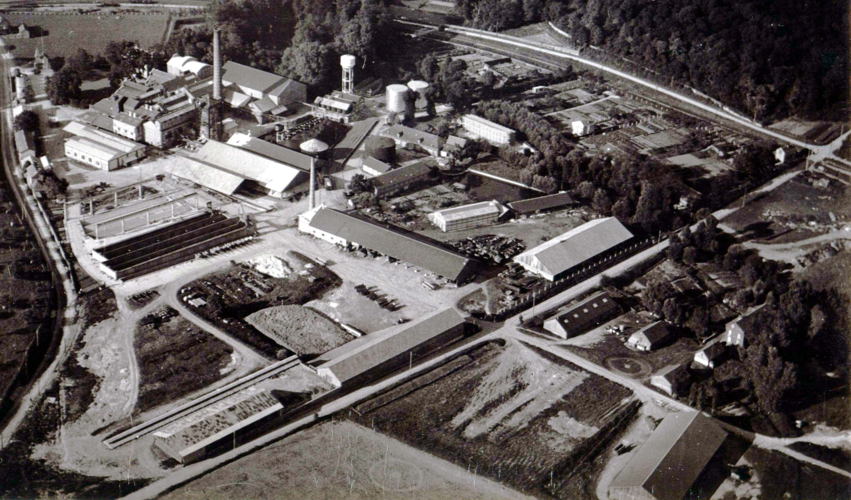 Cliché aérien de la sucrerie d'Étrépagny en 1935.